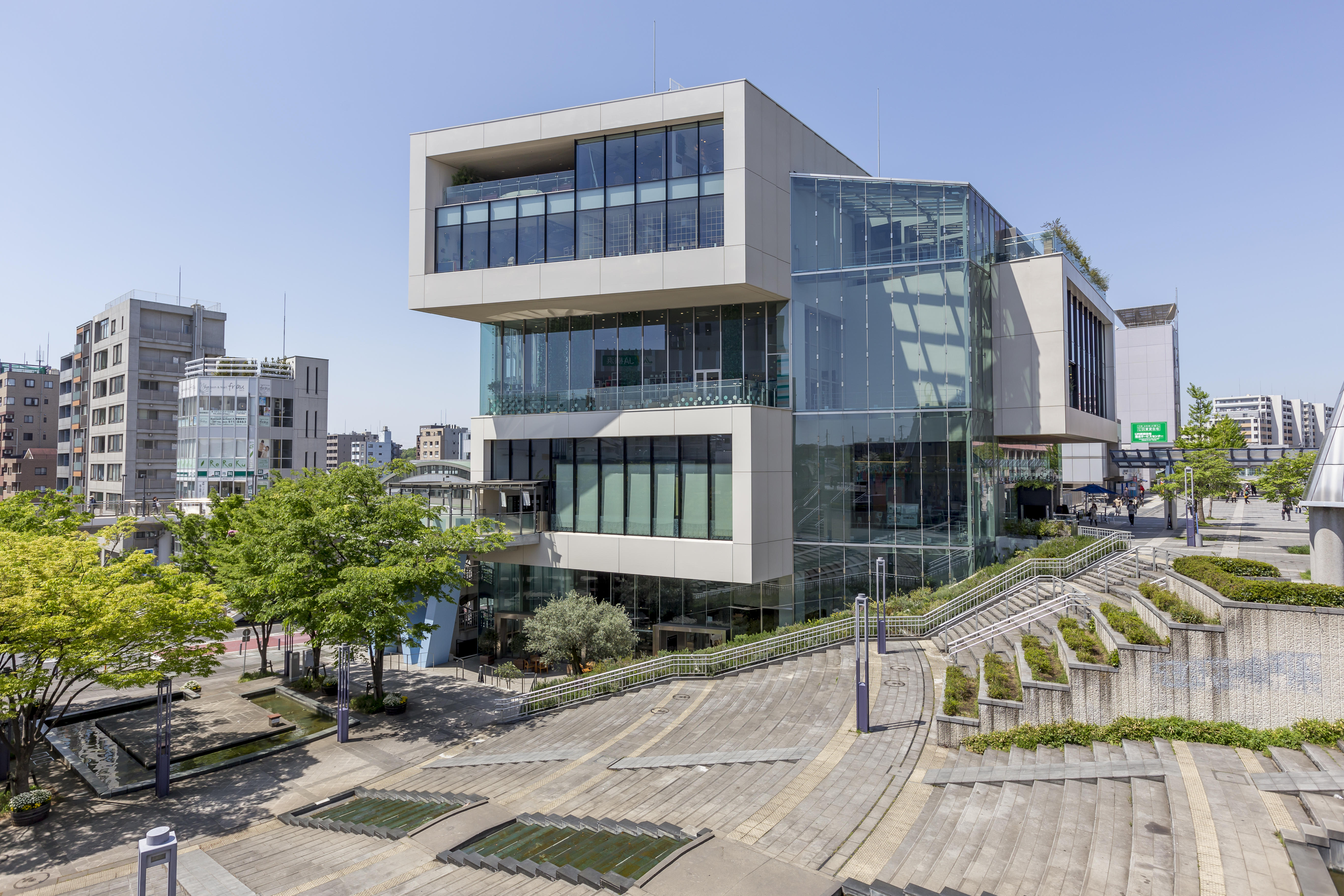 噴水広場からのYotsubako外観